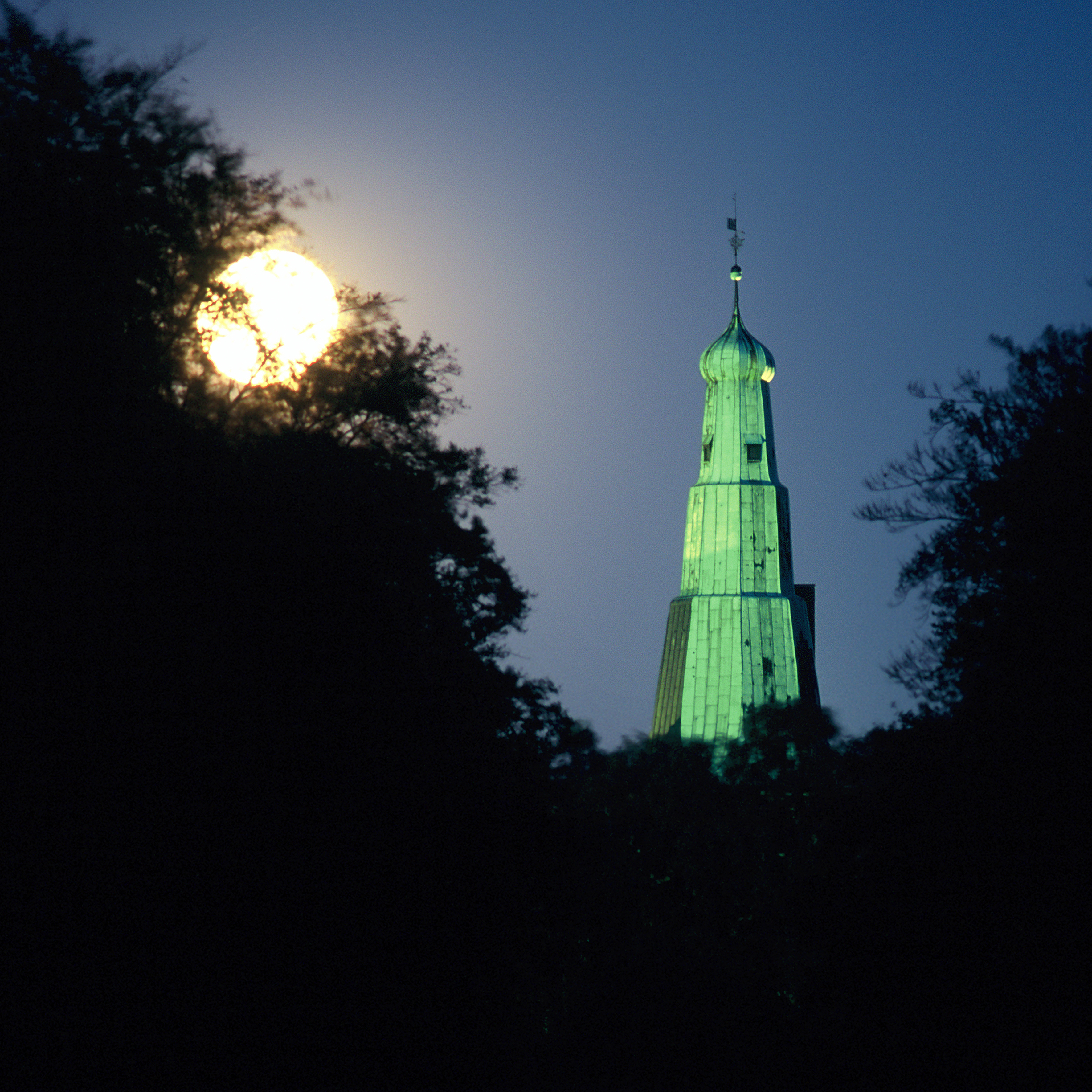 Turmspitze der Hauptburg von Schloss Raesfeld. Bildlich betrachtet und der Überlieferung nach: der sogenannte "Trompetenstoß". Mittels optisch verdichteter Aufnahme in der Sichtachse fotografiert — über den "Langen Teich" hinweg, im "Renaissance-Tiergarten Schloss Raesfeld". Teil des Naturparks "Hohe Mark".